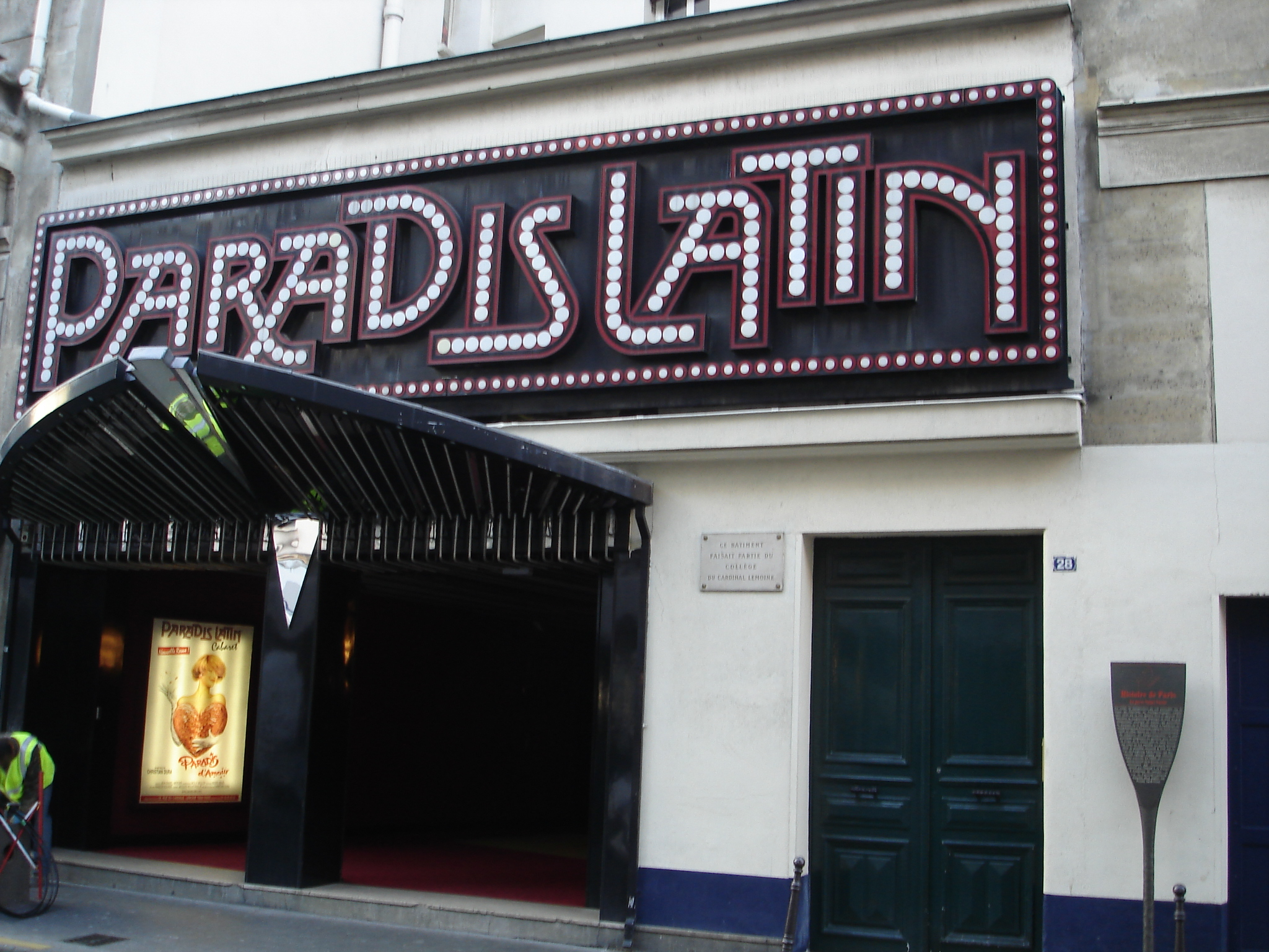 Cabaret: "Paradis-Latin"; rue du Cardinal-Lemoine; Paris